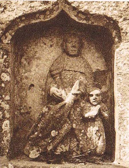 Gvenoleo resanigas sian fratinon Klervi (ĉe la fonto de Keravezan en Saint Frégant).